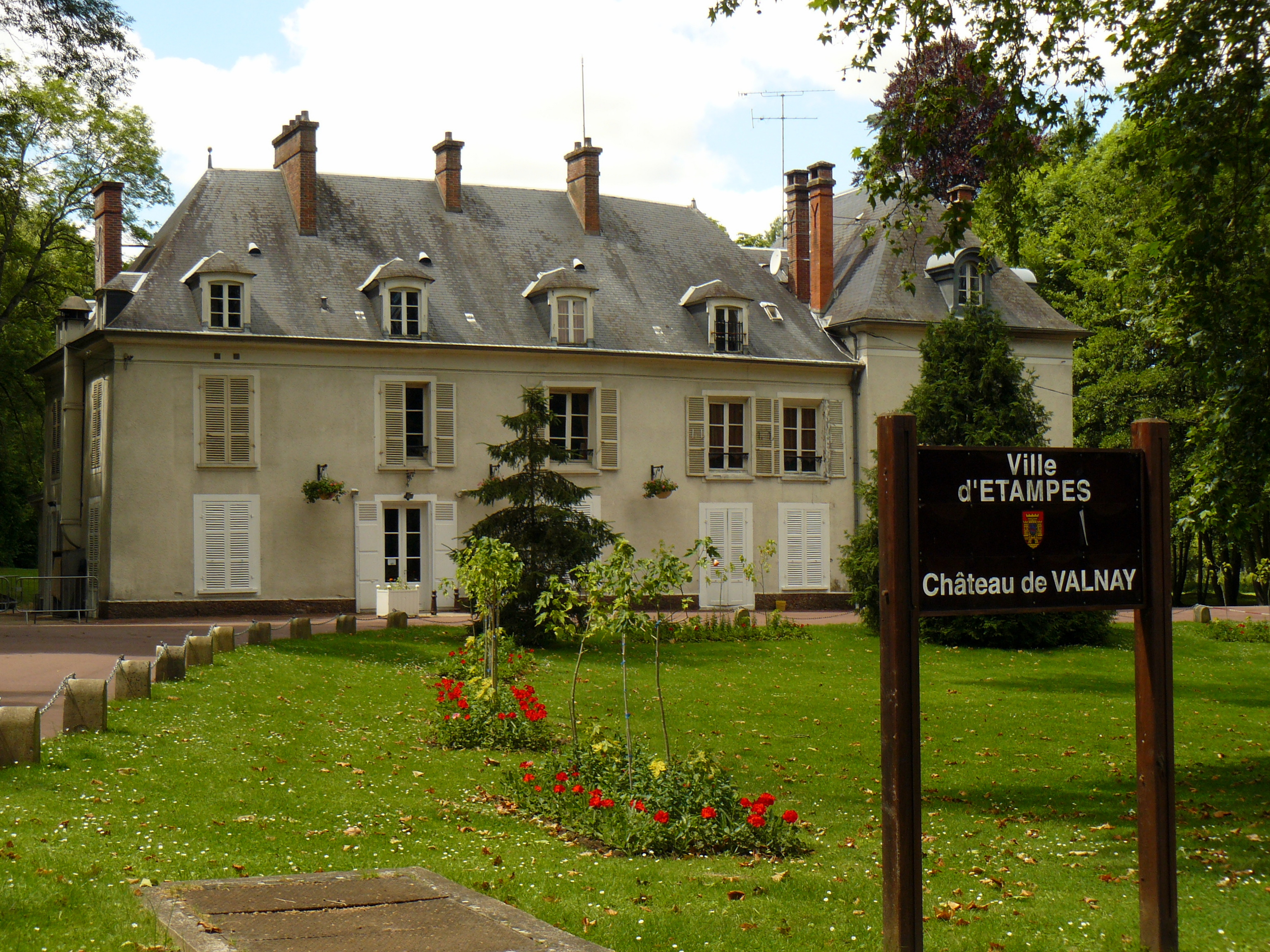 Le château de Valnay à Etampes (Essonne, France). XVIIIe siècle à 1909.